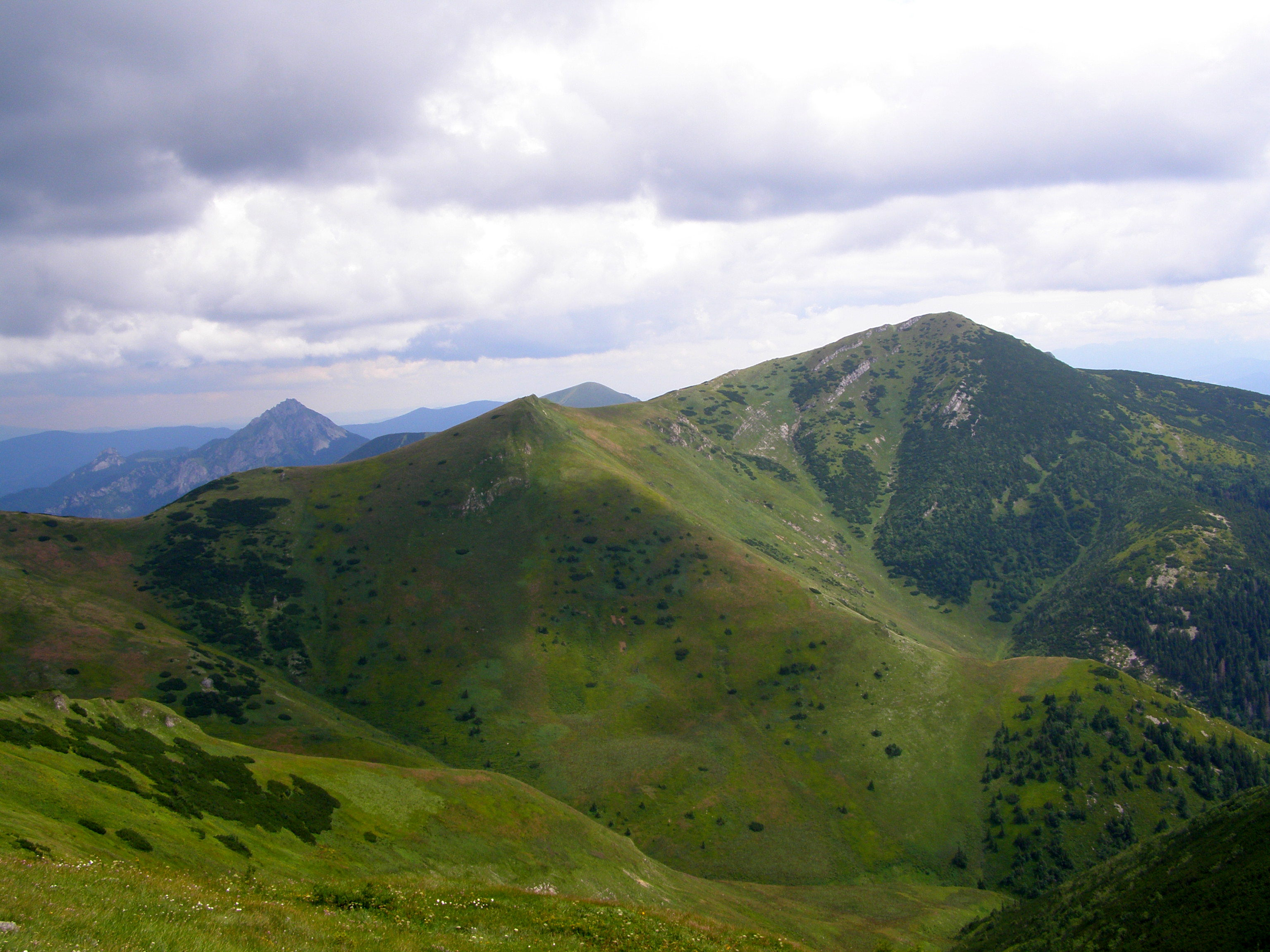 Krivánská Malá Fatra, pohled z úbočí Malého Kriváně, v popředí uprostřed Pekelník (1609 m), vpravo Velký Kriváň (1709 m), v pozadí vlevo Velký Rozsutec (1610 m)